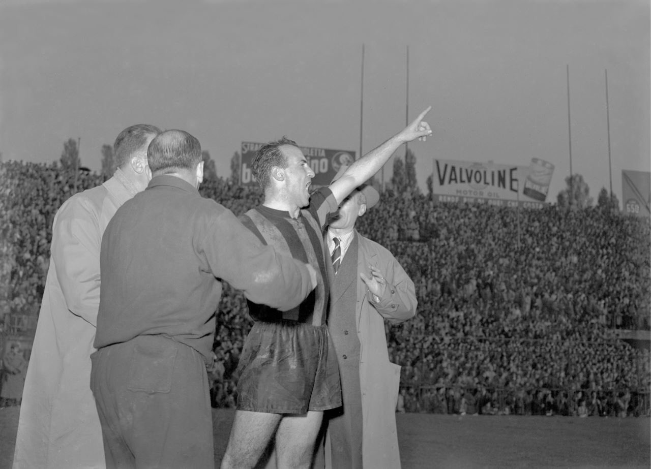 Milano (Italia), stadio San Siro, 6 novembre 1949. Il calciatore interista Amedeo Amadei esulta per la sua tripletta nella sfida tra F.C. Internazionale e A.C. Milan (6-5) valevole per la 10ª giornata del campionato italiano di Serie A 1949-50: tale punteggio è tuttora quello con più reti nella storia del derby di Milano.